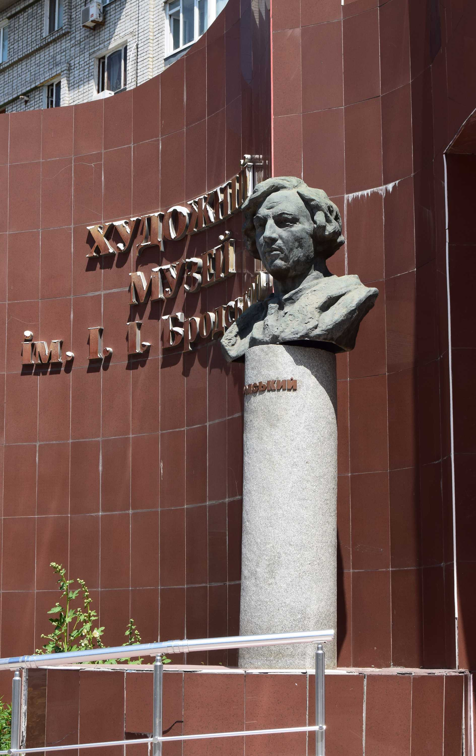 Пам`ятник Бродському І.І. - радянському художнику, Бердянськ, вул. Центральна (К. Маркса), 29